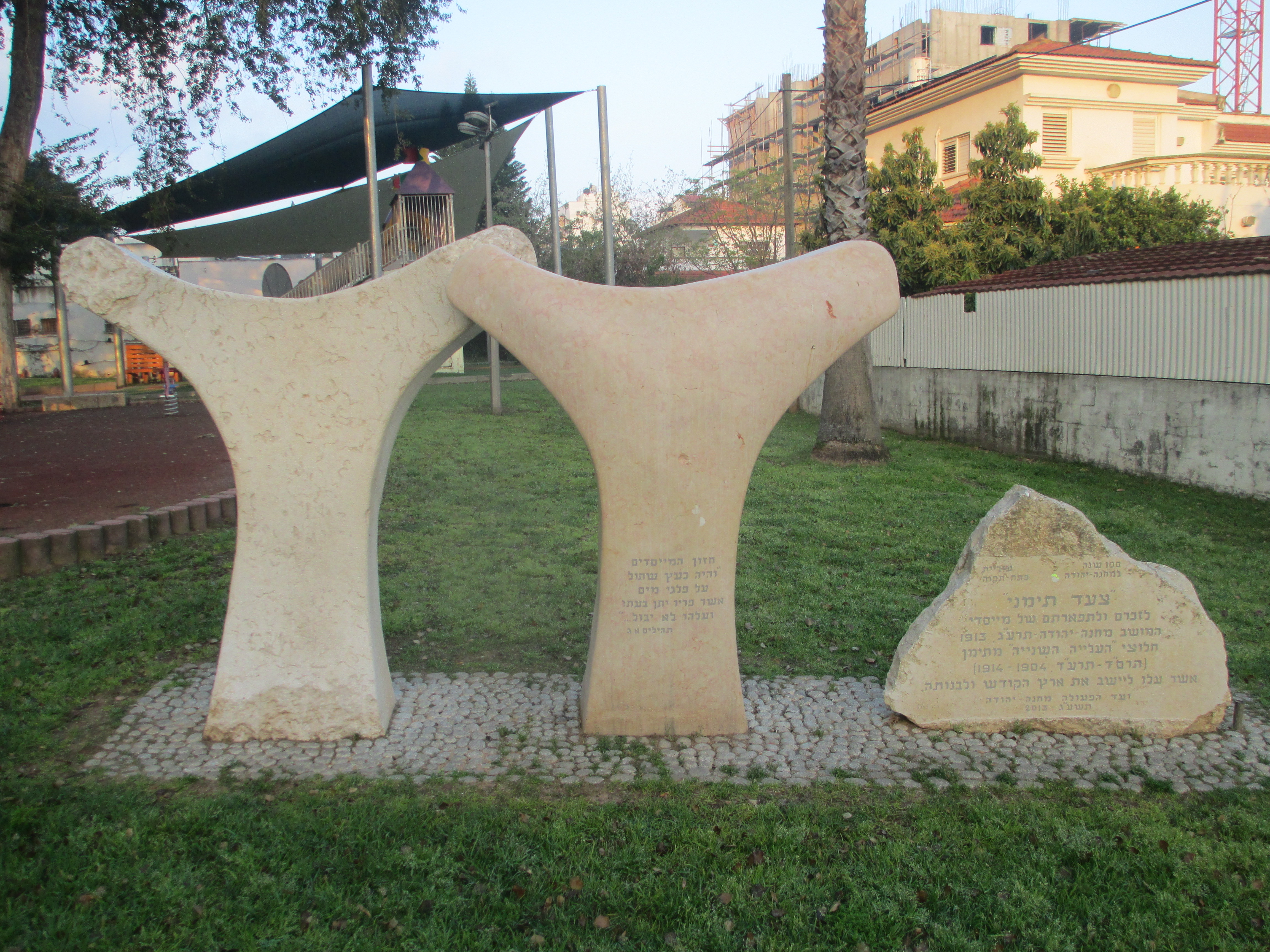 אנדרטה למייסדי מחנה יהודה ברחוב מנחם רצון בפתח תקווה